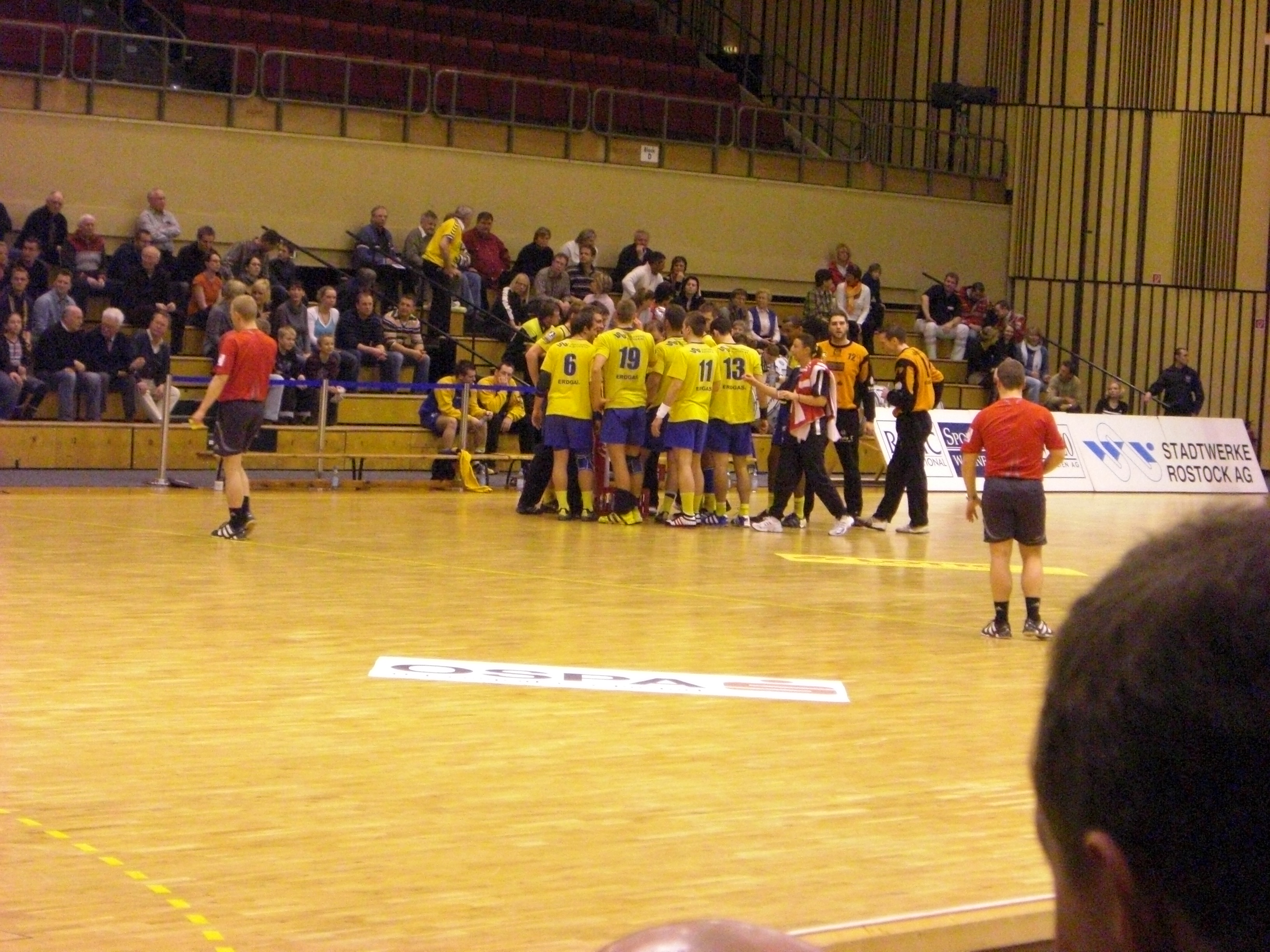 HC Empor Rostock bei einem Teamtimeout im Spiel gegen Emstetten